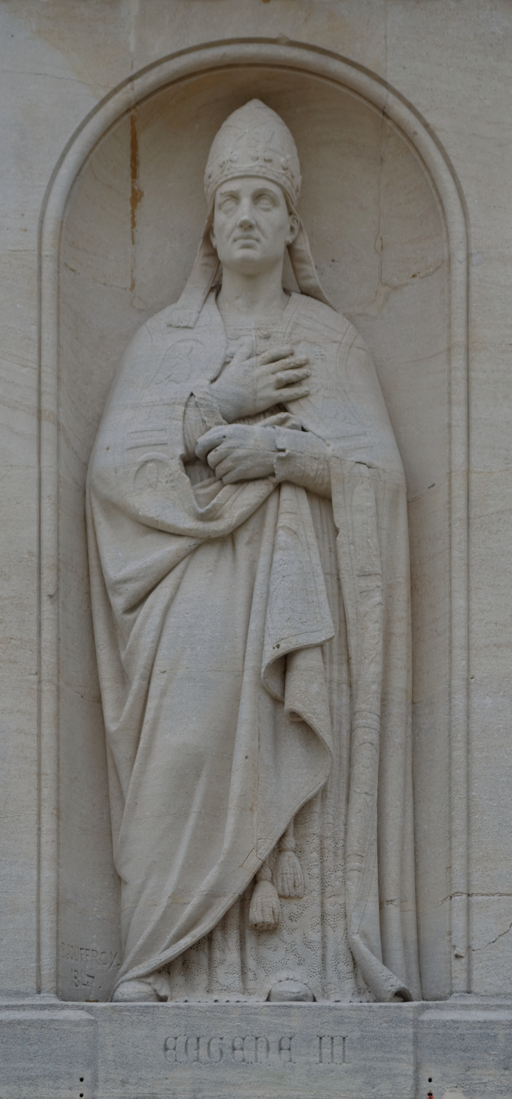 Eugène III (Bernardo Paganelli di Montemagno), né à Pise vers la fin des années 1080 et mort à Tivoli le 8 juillet 1153, fut pape de 1145 à 1153